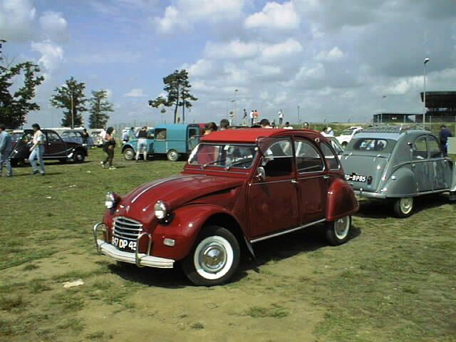 Citroën 2cv Export 1967. Rouge Corsaire AC403. Cliché pris lors de la rencontre nationale au Mans (1999)